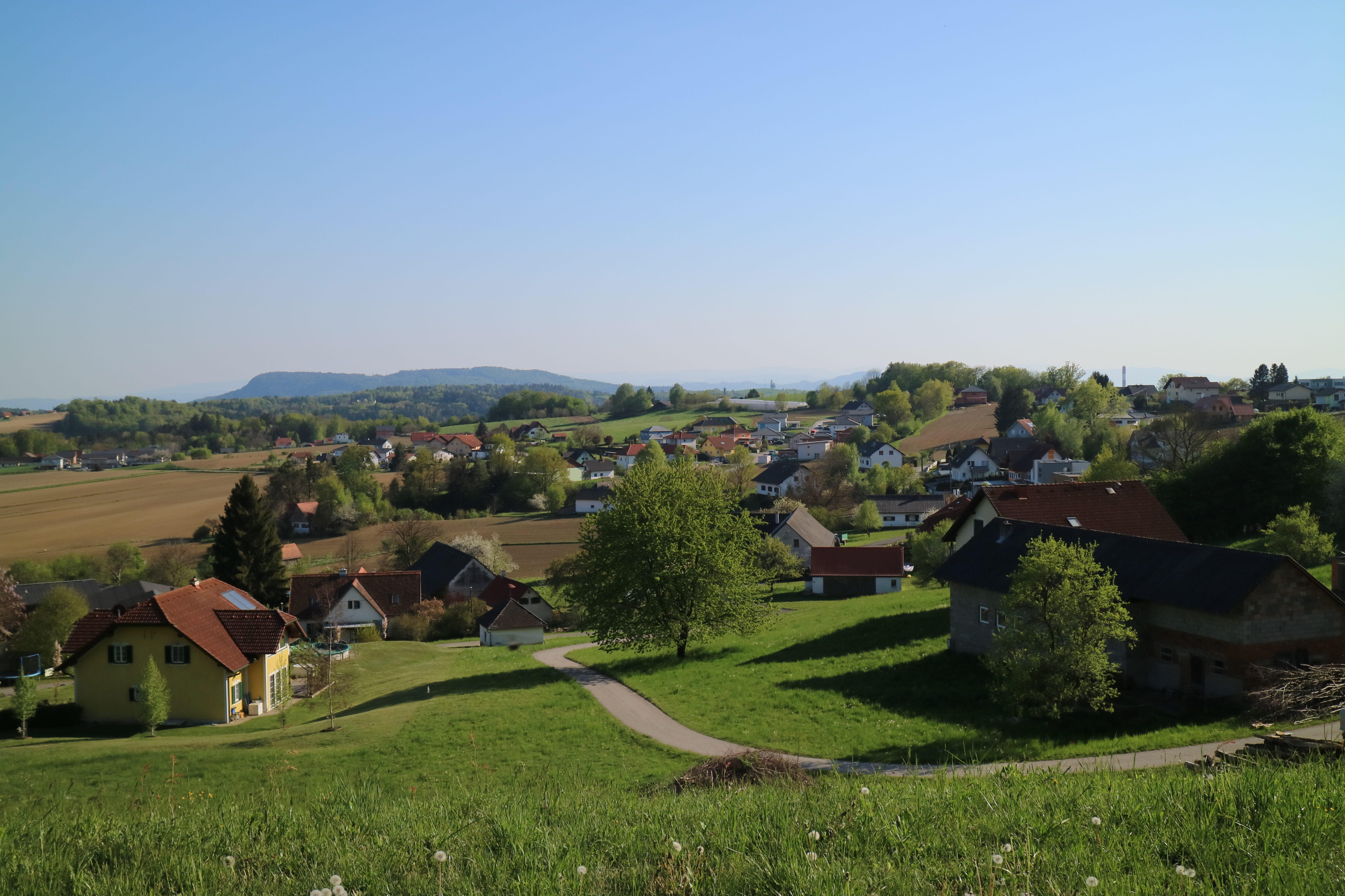 Mellach von Norden (Mellachberg), Gemeinde Fernitz-Mellach, Steiermark